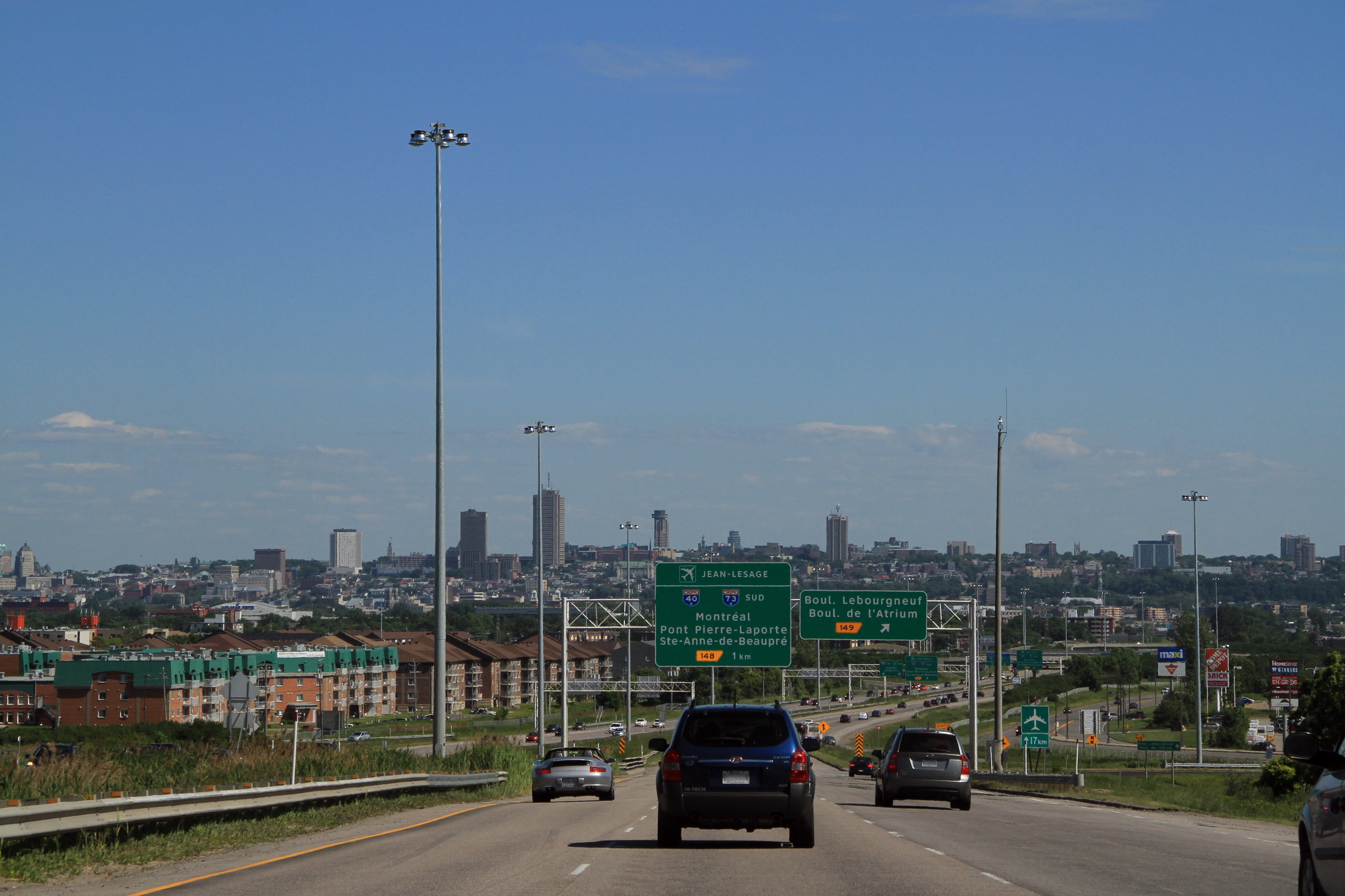 L'autoroute Laurentienne (A73) en direction Sud à la hauteur de la rue Bouvier dans l'arrondissement Les Rivières de la ville de Québec.